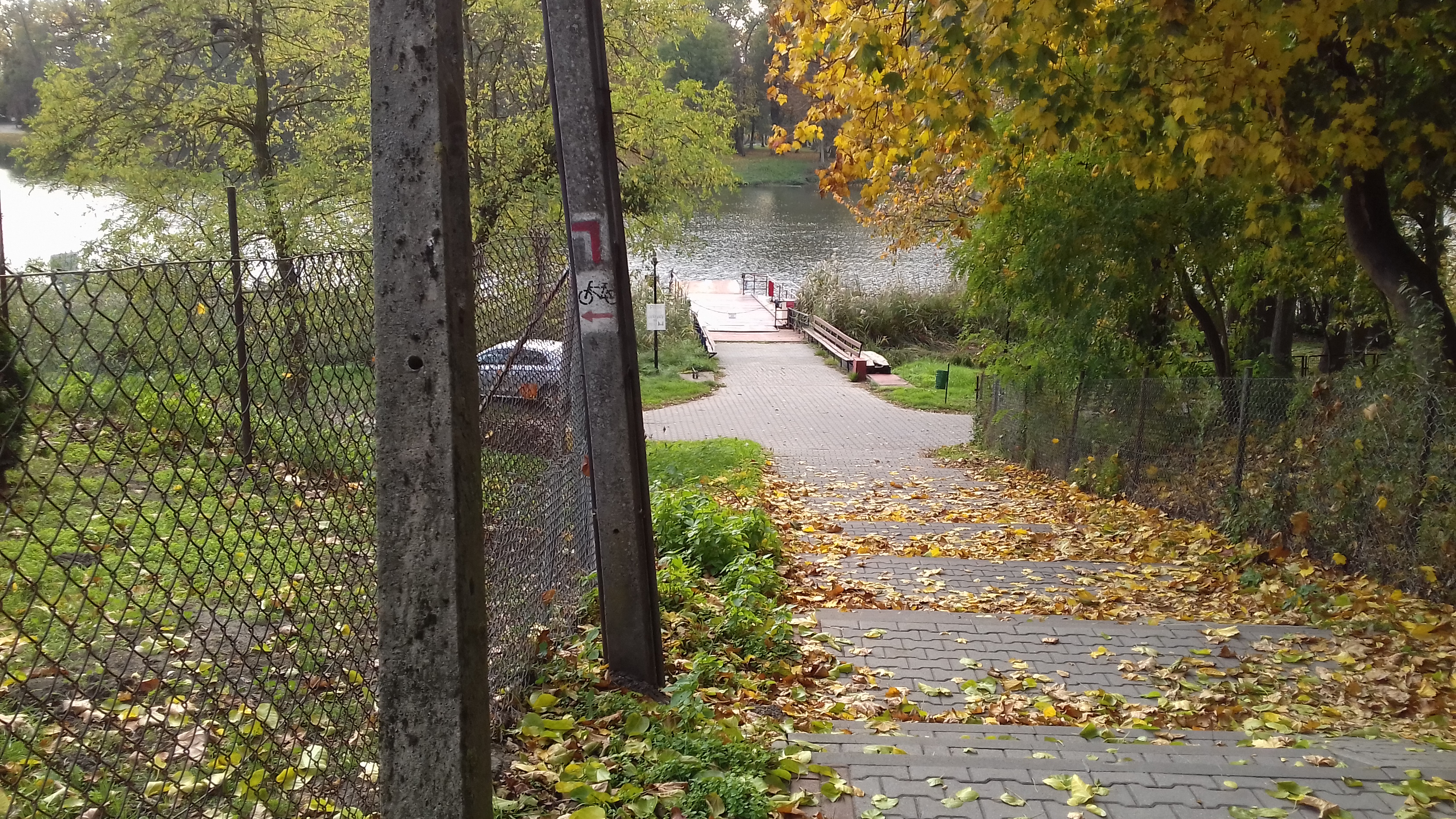 Oznaczenie szlaku pieszego nr 186 (czerwonego) w Zaniemyślu koło promu na wyspę Edwarda